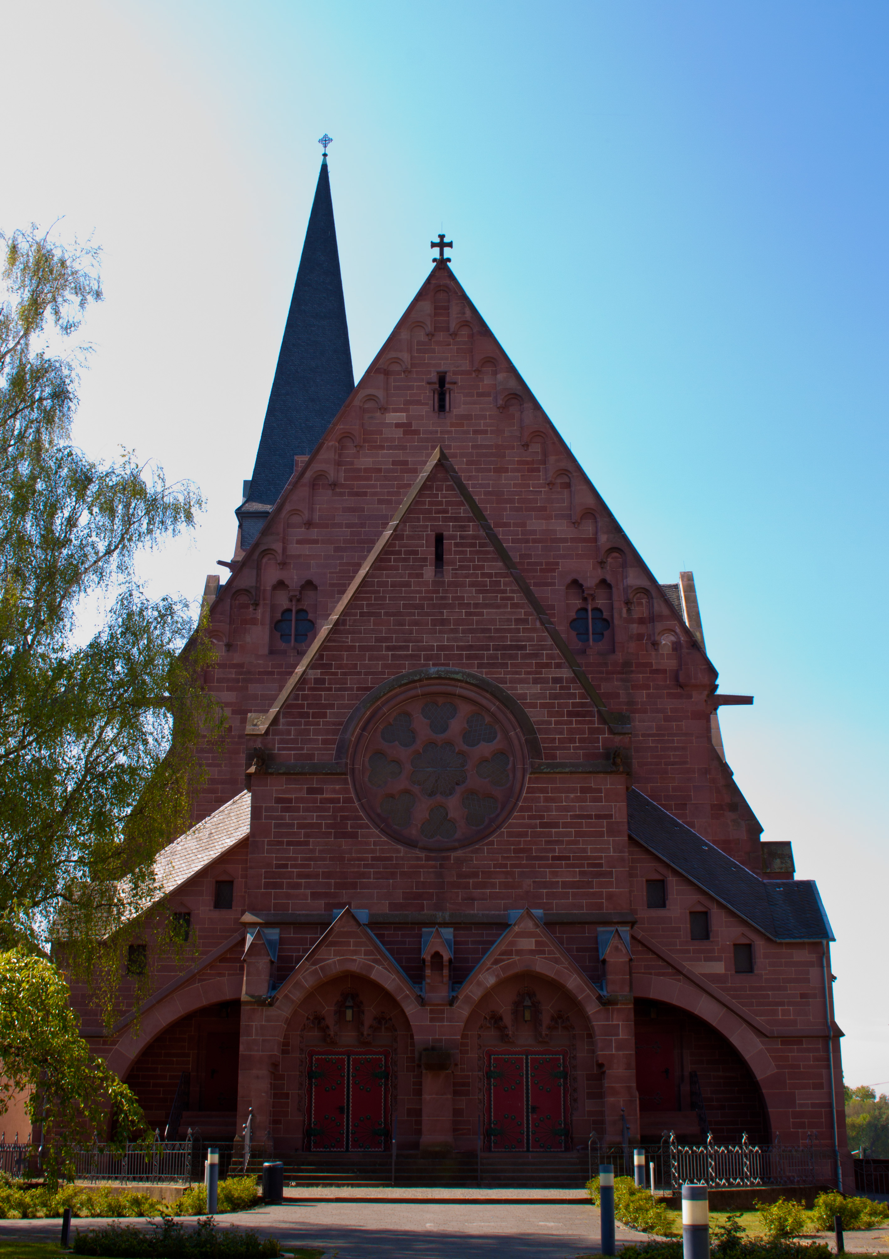 Die Oranier-Gedächtniskirche in Wiesbaden-Biebrich.